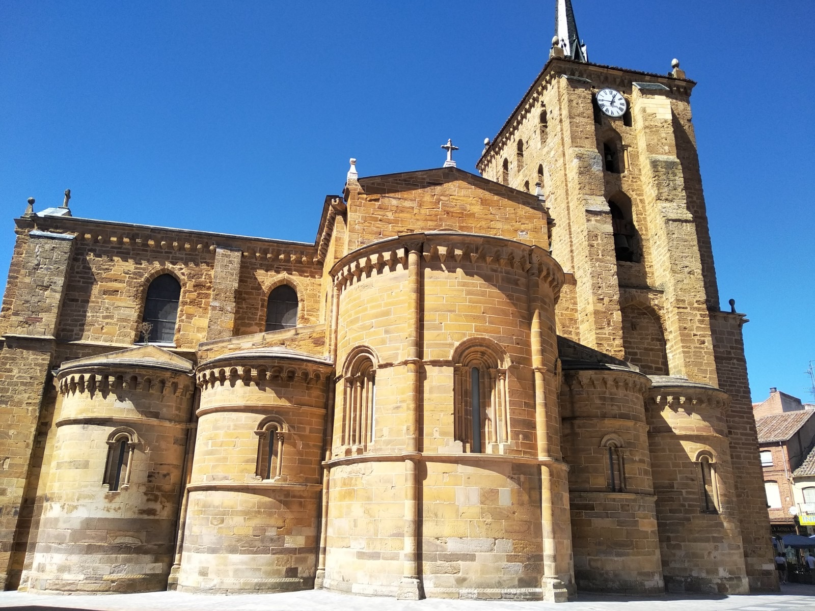 Fachada de cinco absides en la Iglesia de Santa María del Azogue en Benavente (Zamora)